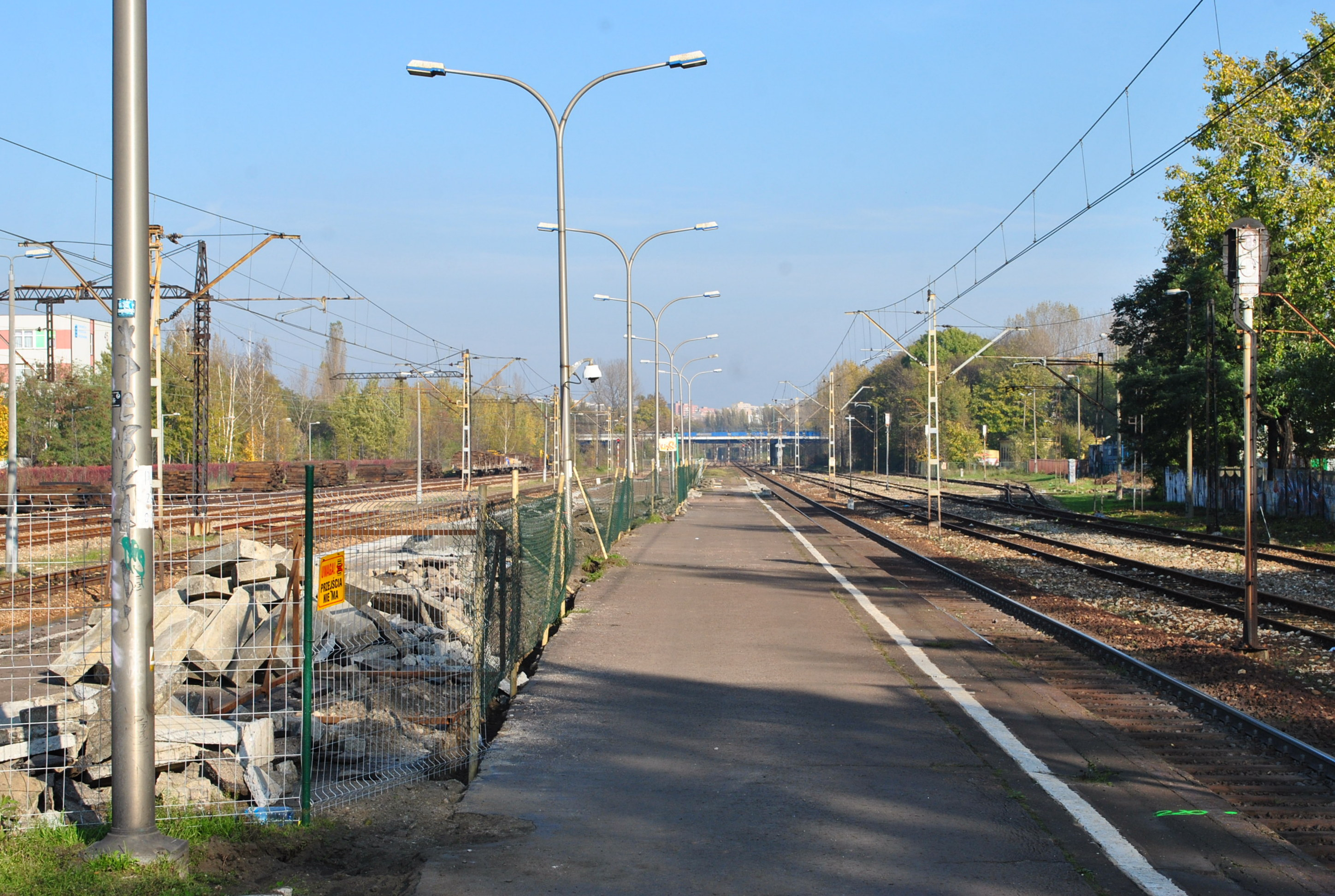 Stacja Sosnowiec Główny - widok na peron 2. w kierunku Warszawy Centralnej